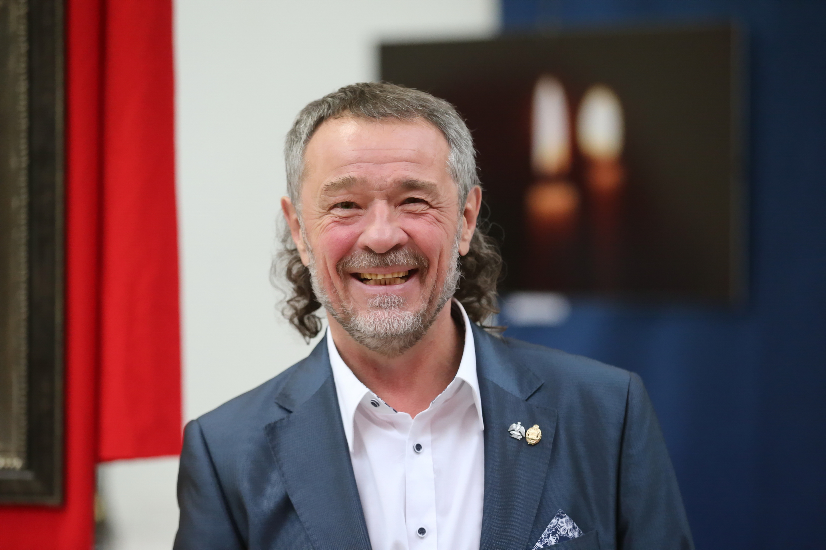 Тихомиров Александр Евгеньевич - Народный художник Российской Федерации.